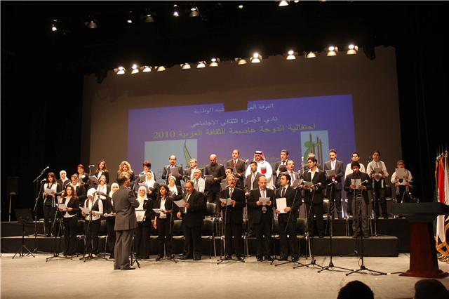 صورة الفرقة العربية للأناشيد الوطنيـة